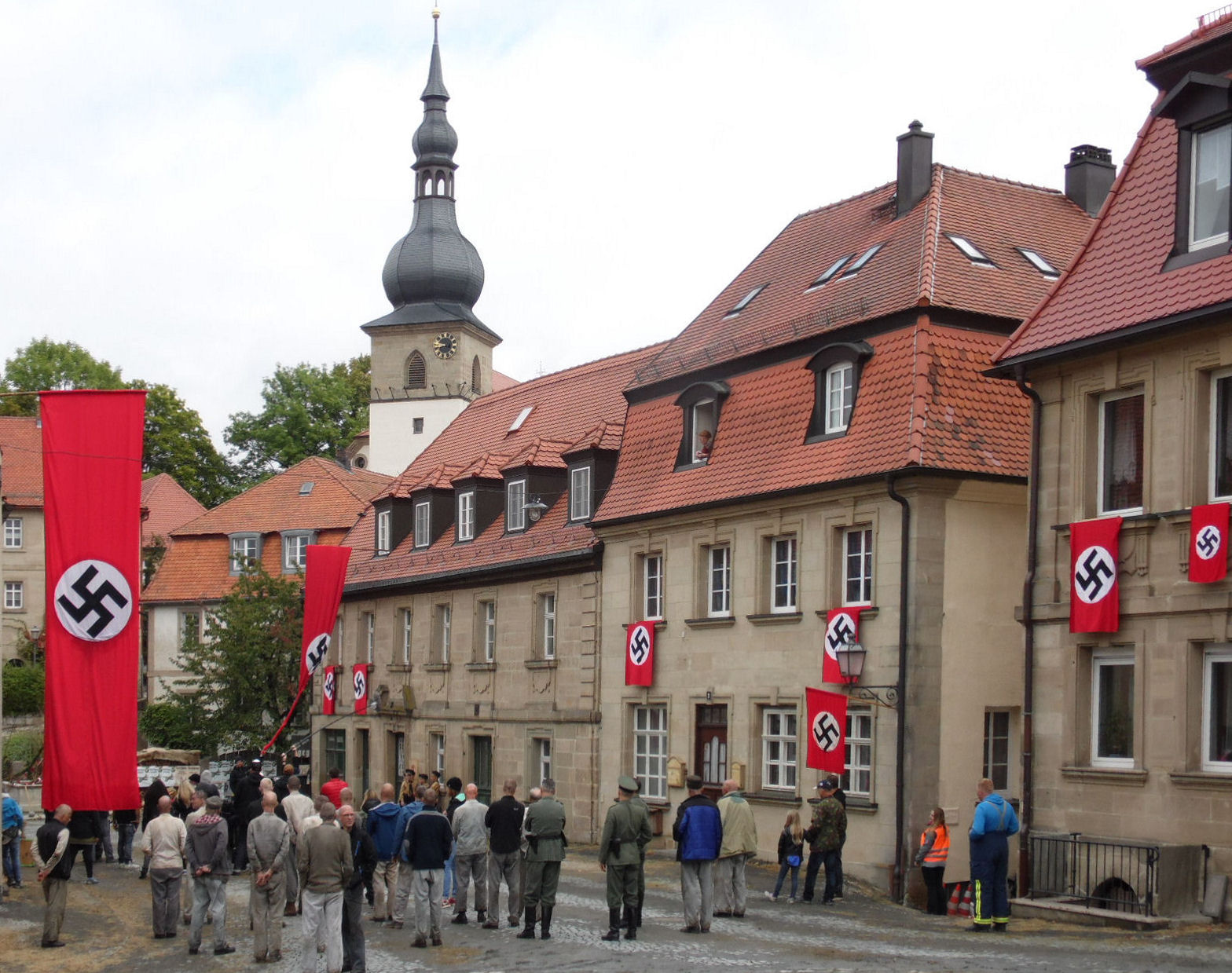 Der Ortsteil Obermarkt von Weidenberg während der Dreharbeiten zum Film Elser – Er hätte die Welt verändert